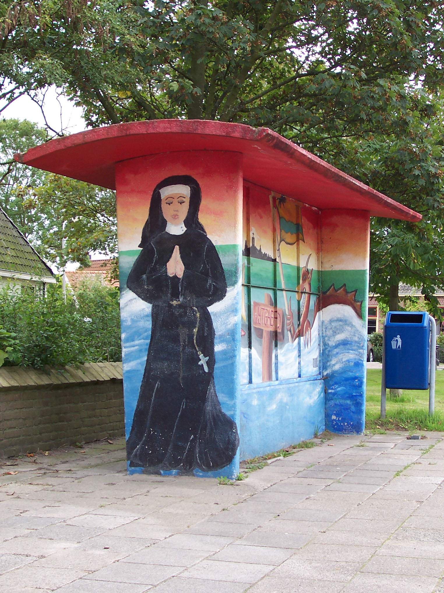 Wytgaard, bushalte